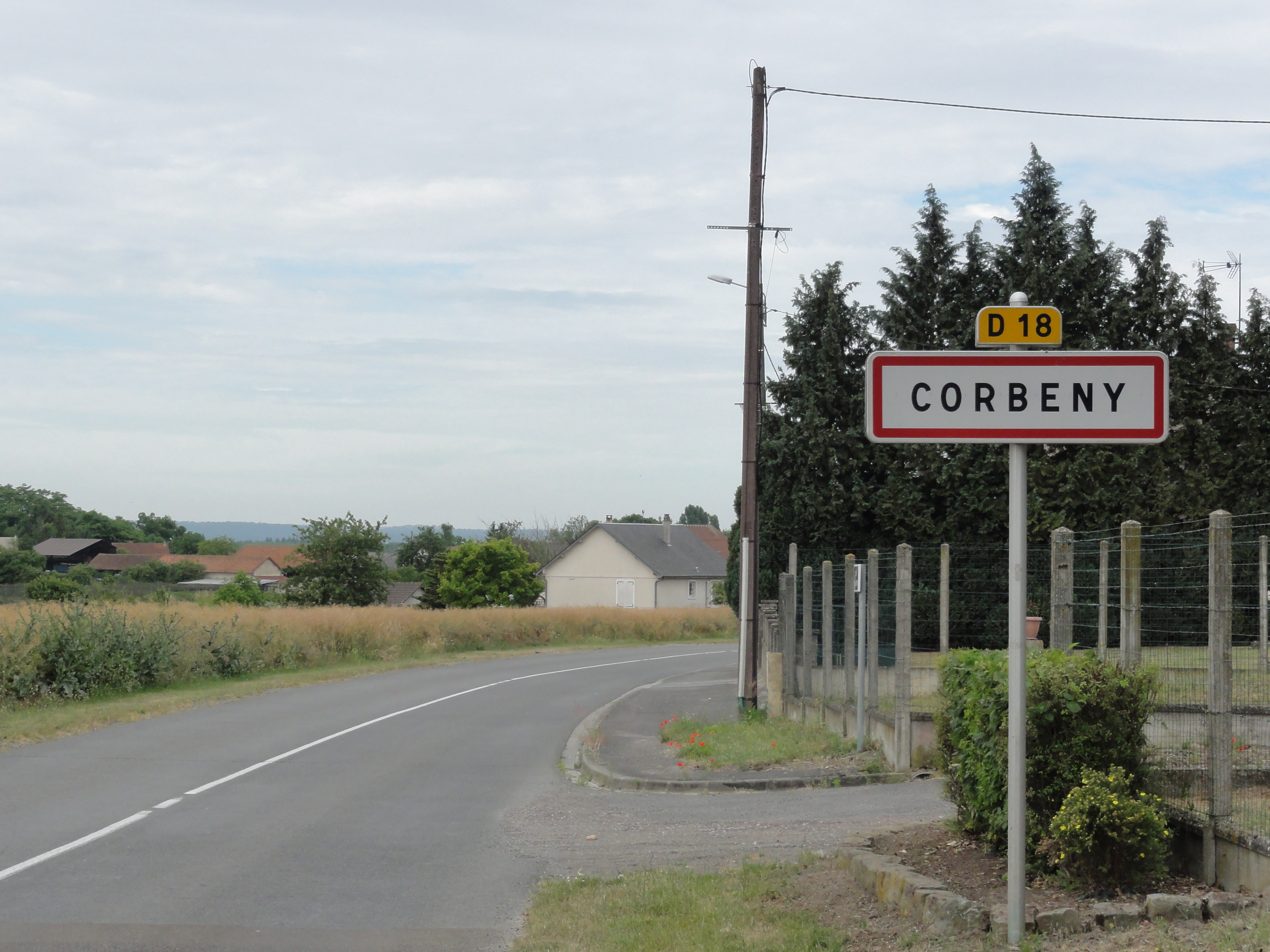 Corbeny (Aisne) city limit sign